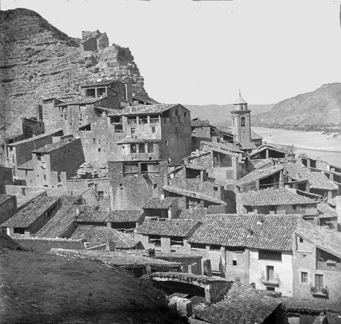 Vista general de Faió. Josep Salvany i Blanch (1915)